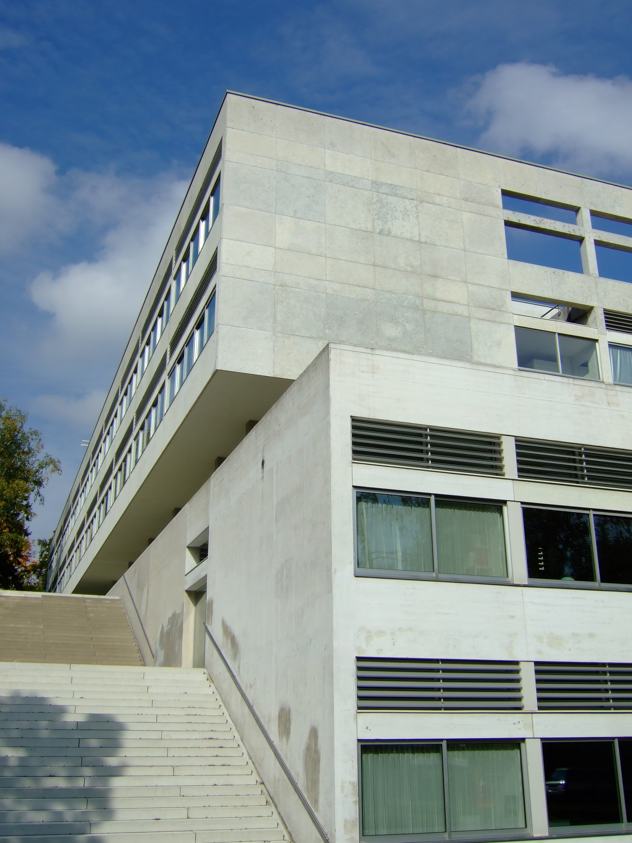 Die Kantonsschule Enge in Zürich 2008